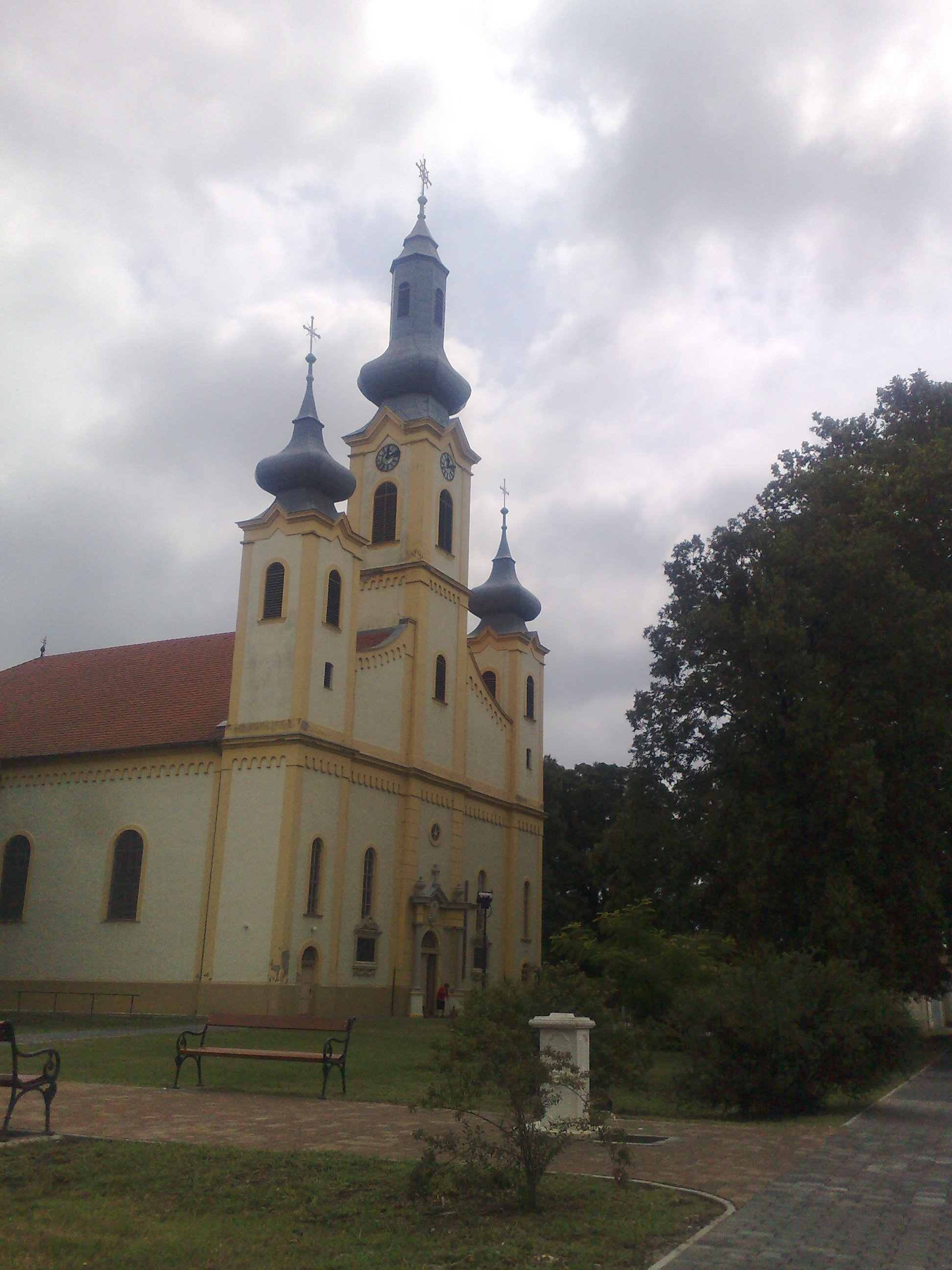 Szany - Szent Kereszt megtalálása római katolikus templom